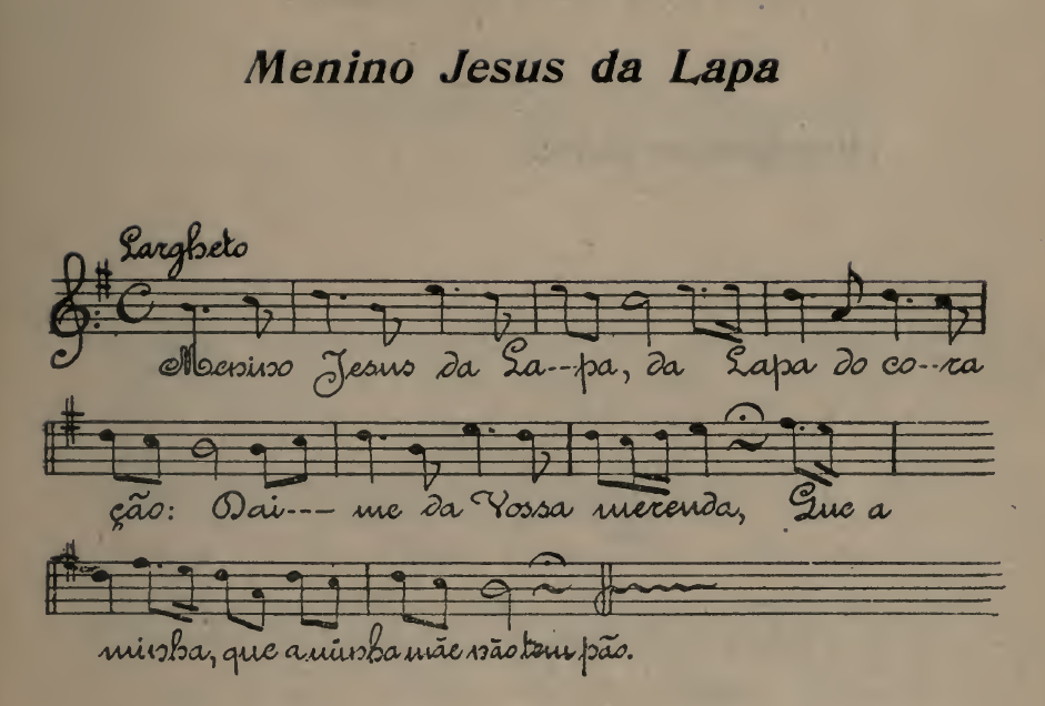 Menino Jesus da Lapa, cantiga de Natal tradicional recolhida por Pedro Fernandes Tomás.